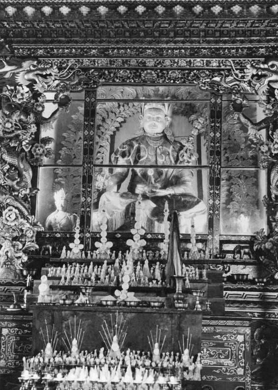 Tibetexpedition, Statue im Potala Lhasa, Götterfigur im Potala (Kloser Serra) [Guru Rimposhe Padma Sam Pawa]